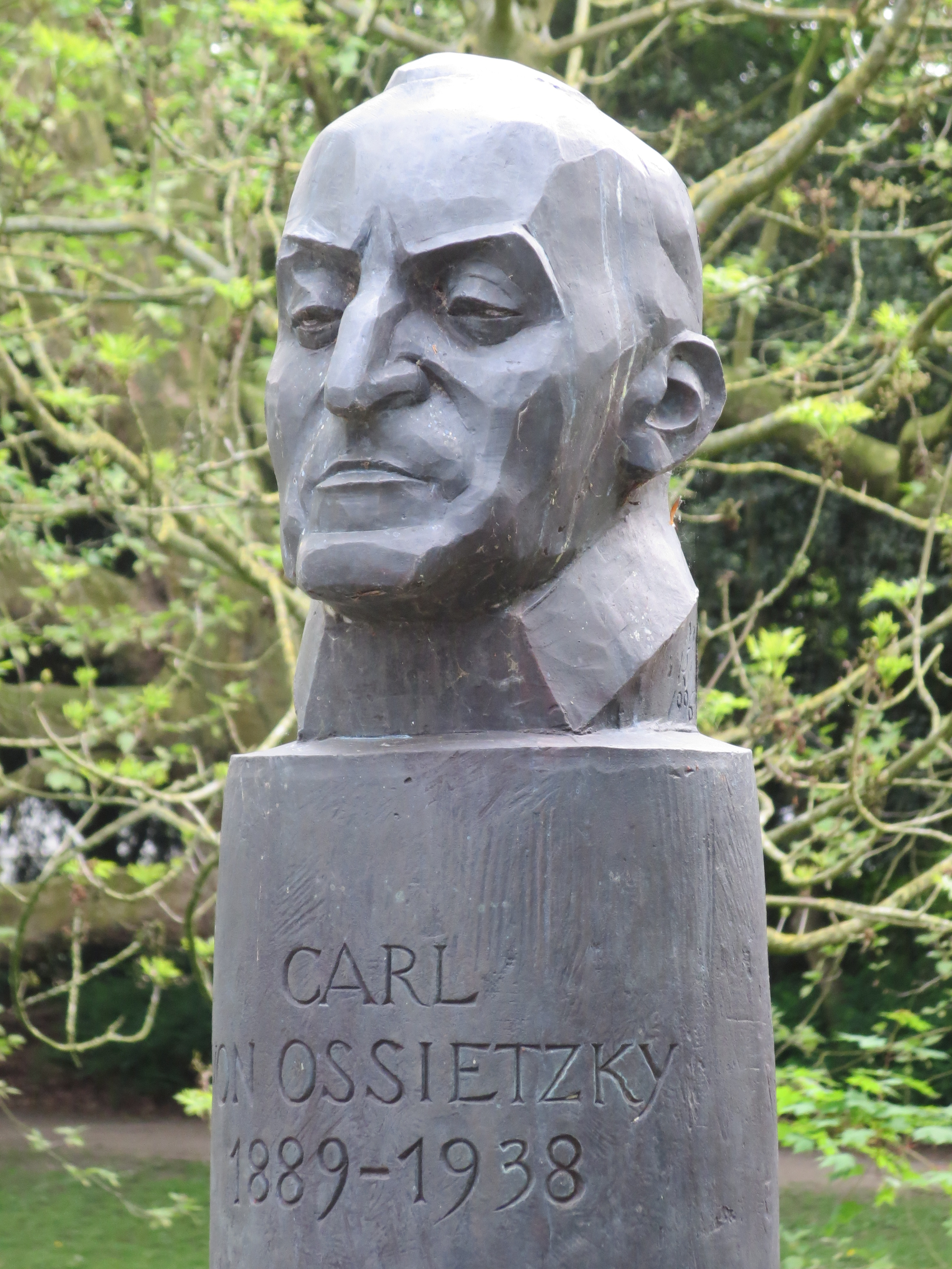 Büste Carl von Ossietzky, Bildhauer Manfred Sihle-Wissel